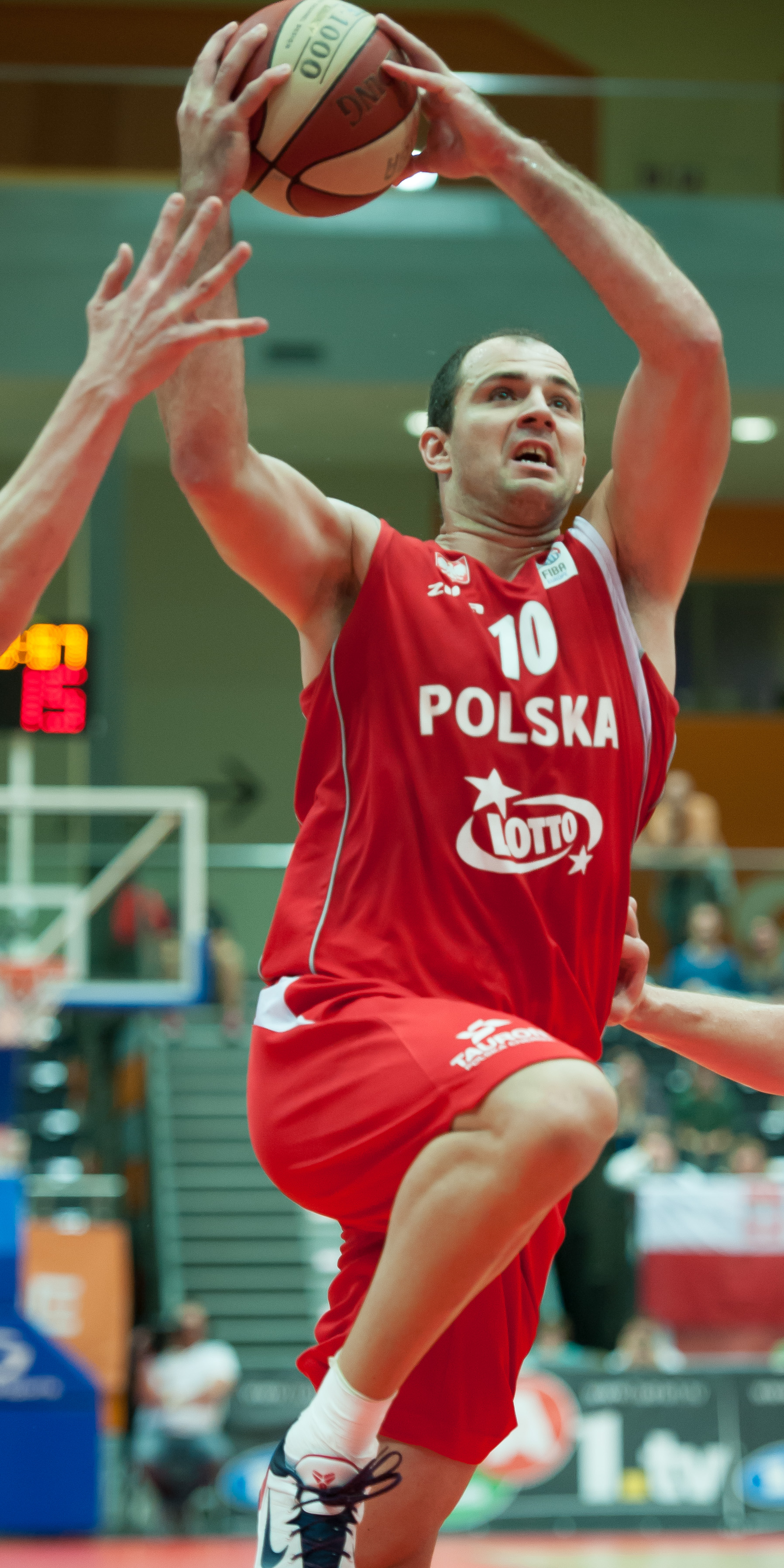 Basketball EM-Qualifikation Österreich gegen Polen Schwechat, 17. August 2014